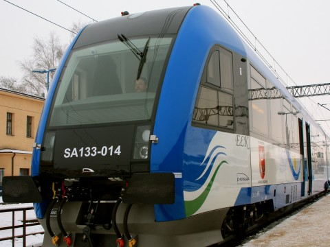 Szynobus EŁK stoi na stacji w Ełku